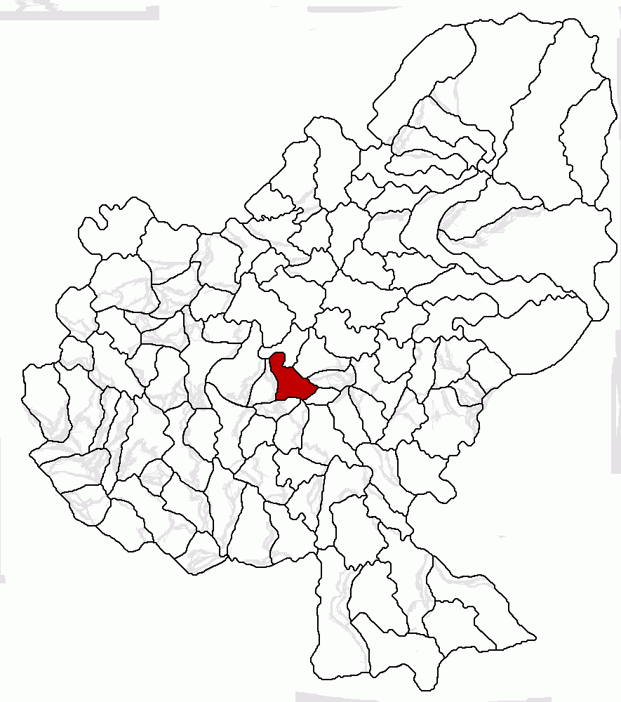 Categorie:Hărţi ale judeţului Mureş